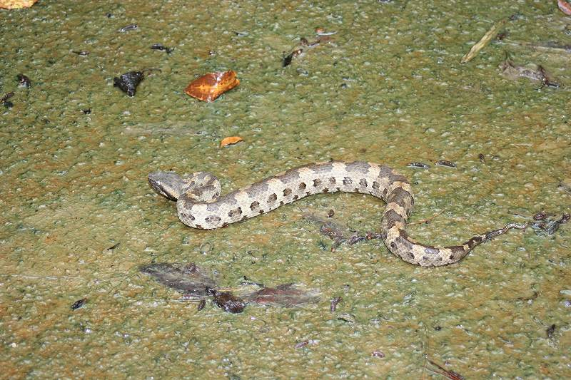 Okinawa Pit Viper or Himehabu, (Ovophis okinavensis) or (Trimeresurus okinavensis).